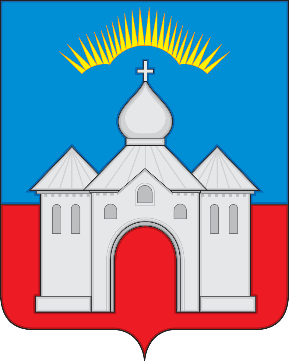 Герб Кандалакшского района, Мурманская область